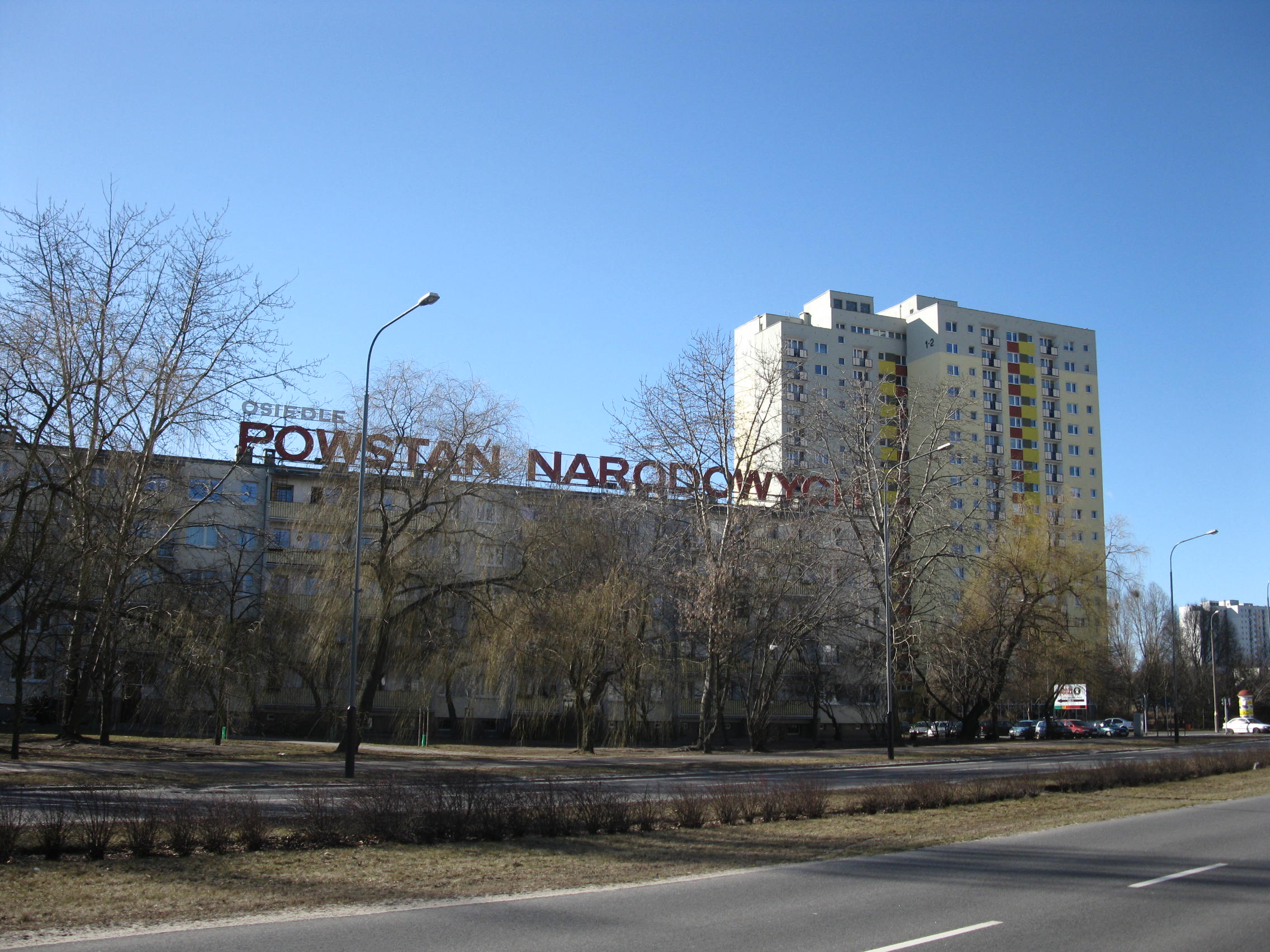 Osiedle Powstań Narodowych w Poznaniu